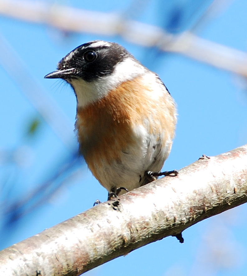 tec tec male